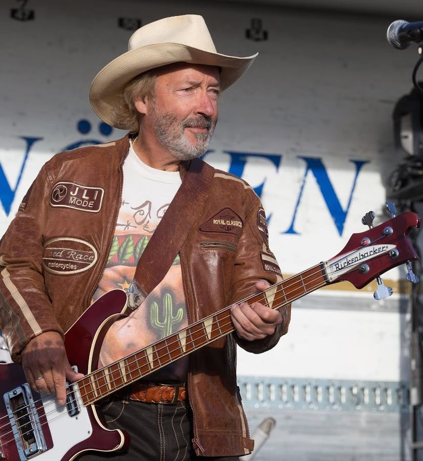 Easy The Eagles Tribute Band keikalla 12.8.2016 Haltialan Hayride Country festareilla.